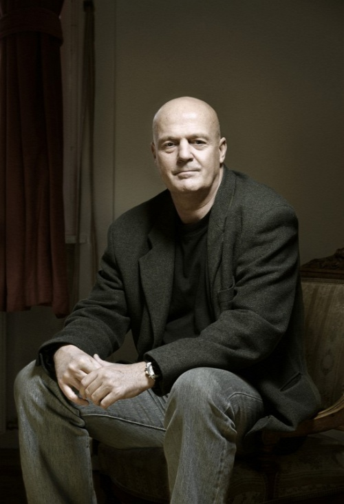 Kukorelly Endre magyar író, költő, újságíró, kritikus.